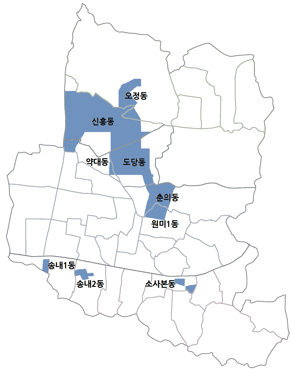 부천시의 공업지역 위치